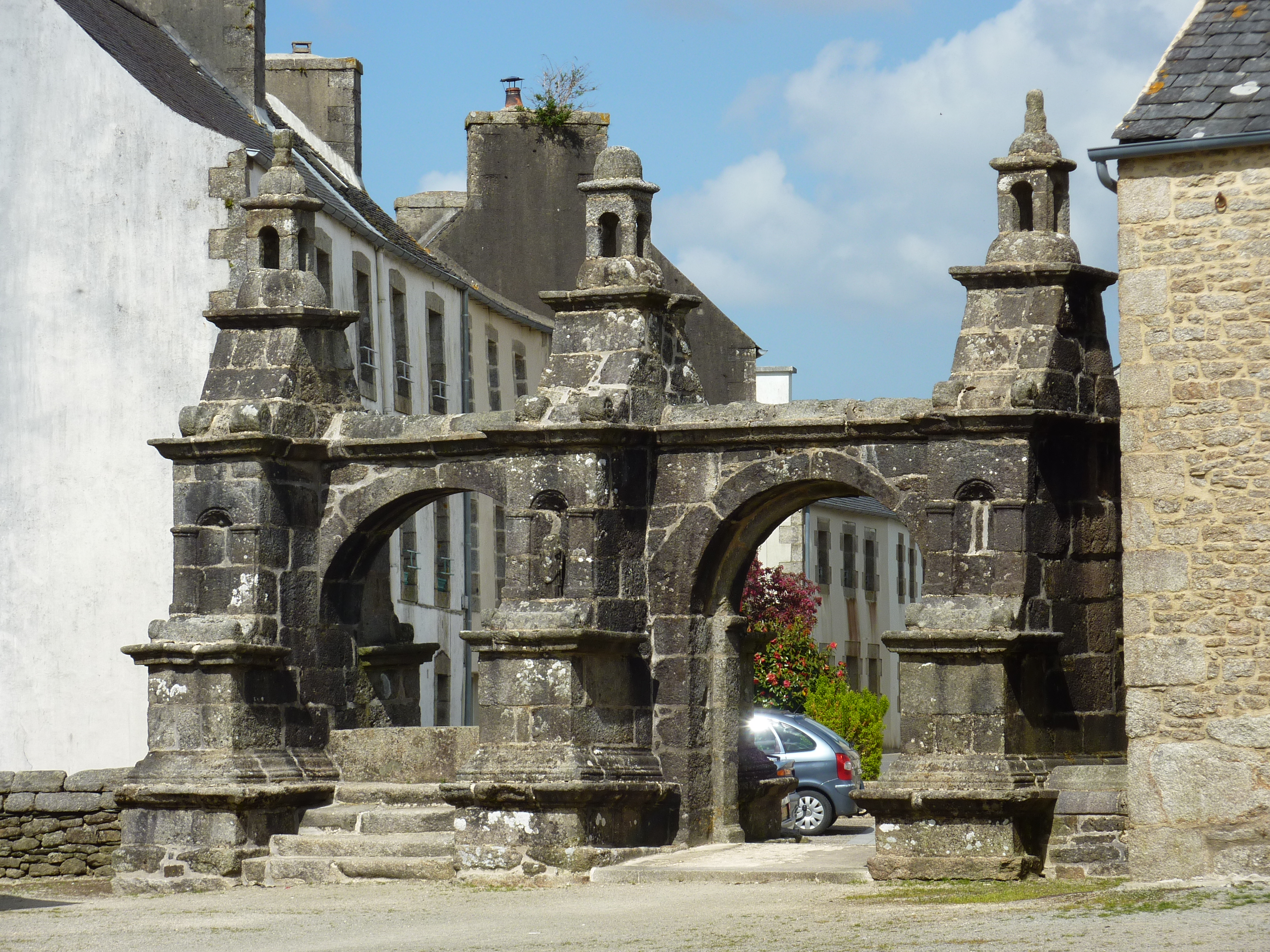 Arc de triomphe Plounéour-Menez 1